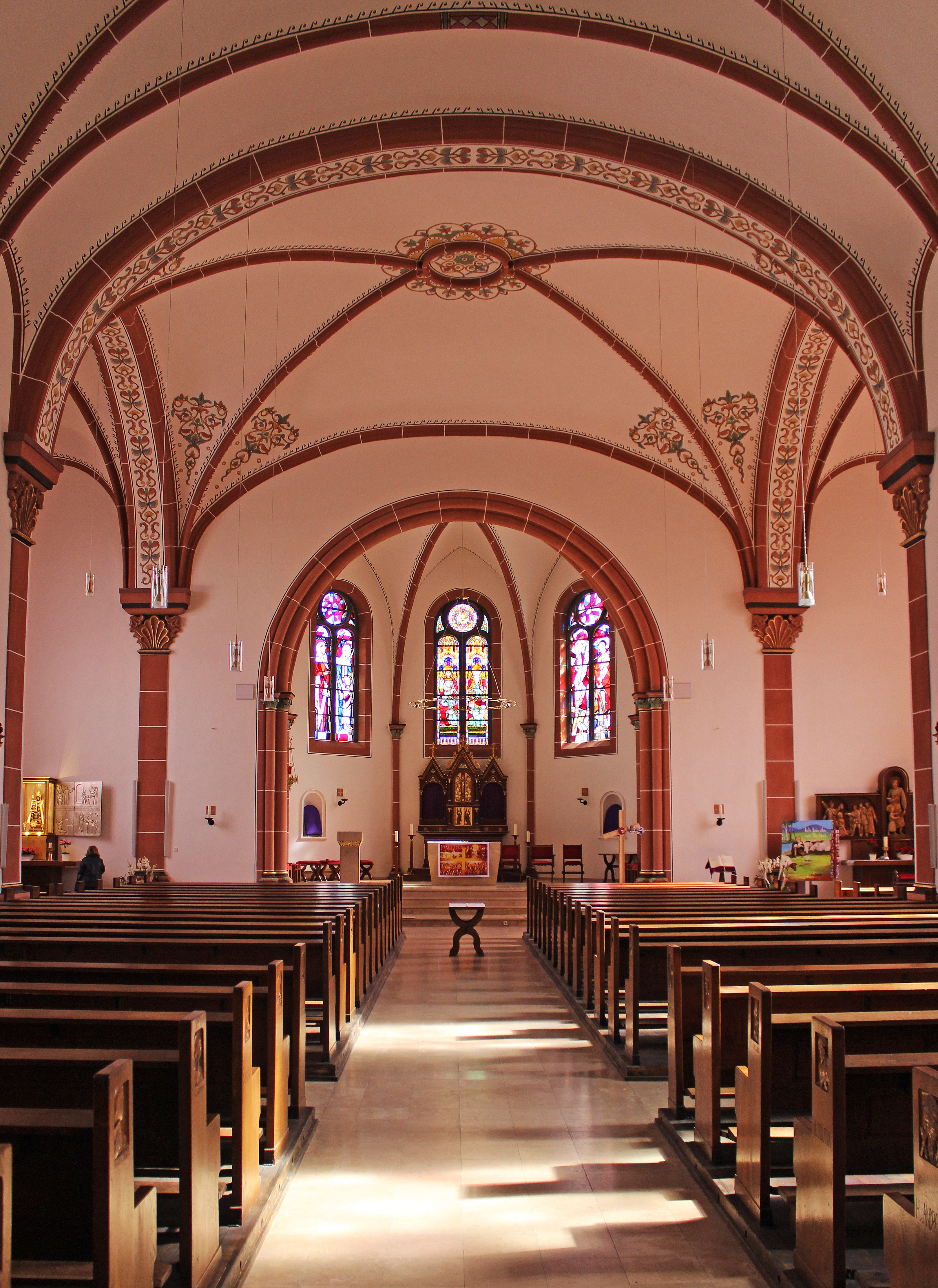 Blick ins Innere der katholischen Pfarr- und Wallfahrtskirche St. Josef in Riegelsberg, Regionalverband Saarbrücken, Saarland